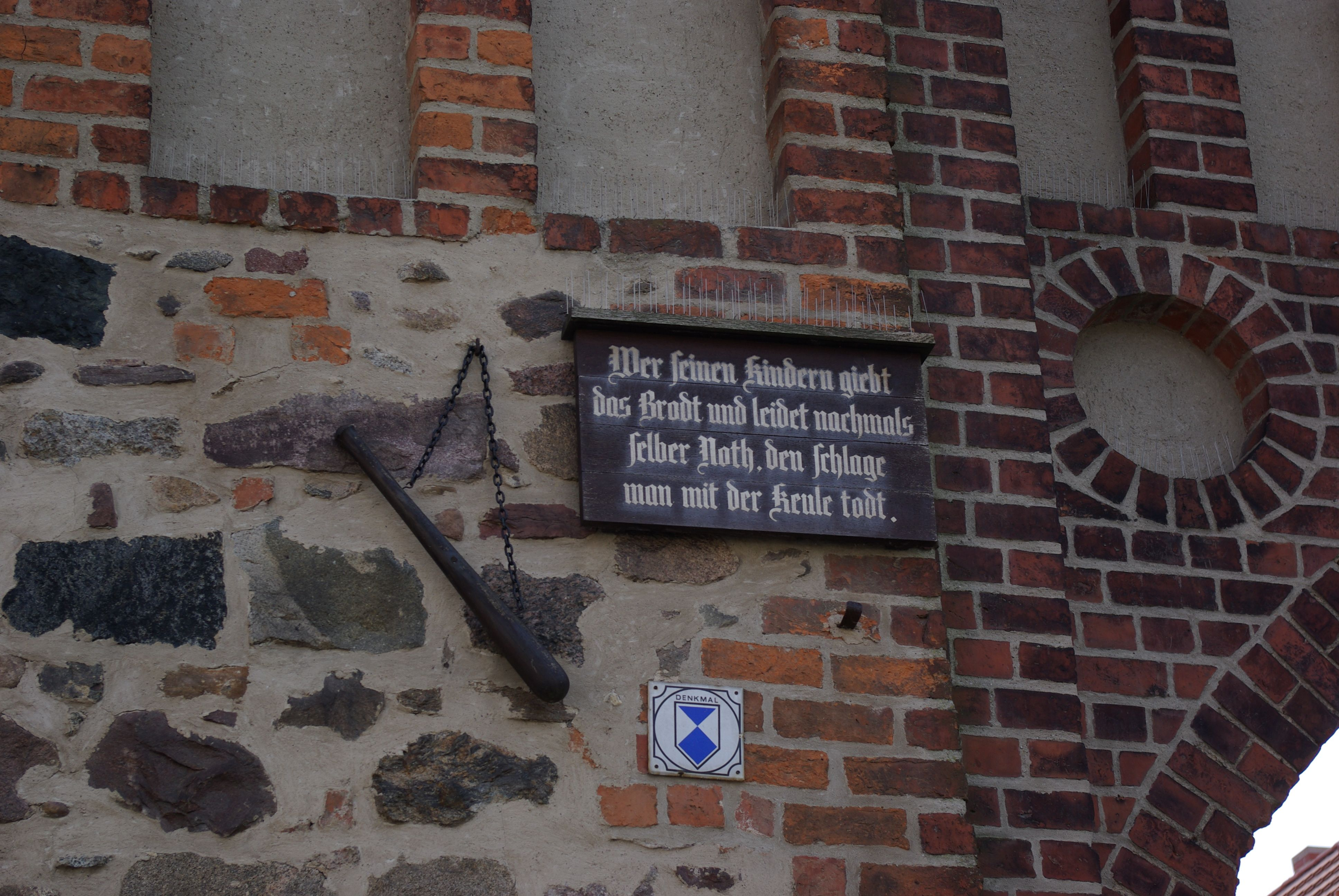 Jüterbog in Brandenburg. Die Jüterboger Keule war ehemals an allen Toren Jüterbogs vorhanden. Das Bild zeigt die Keule am Zinnaer Tor.